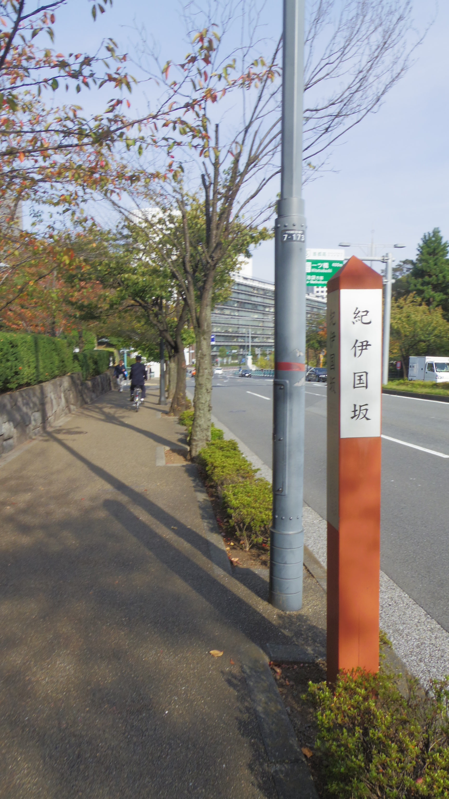 東京都港区にある坂、紀伊国坂。